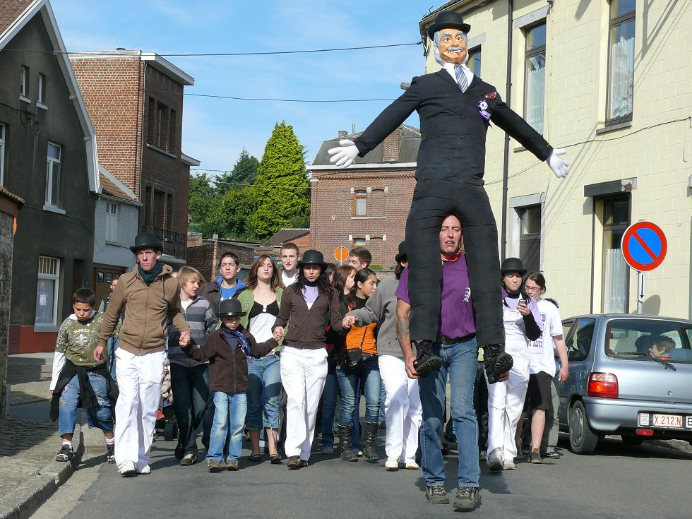 Premier cortège matinal. "On promène d'Jean" dans les rues du village de Landelies (Montigny-le-Tilleul-Belgique)